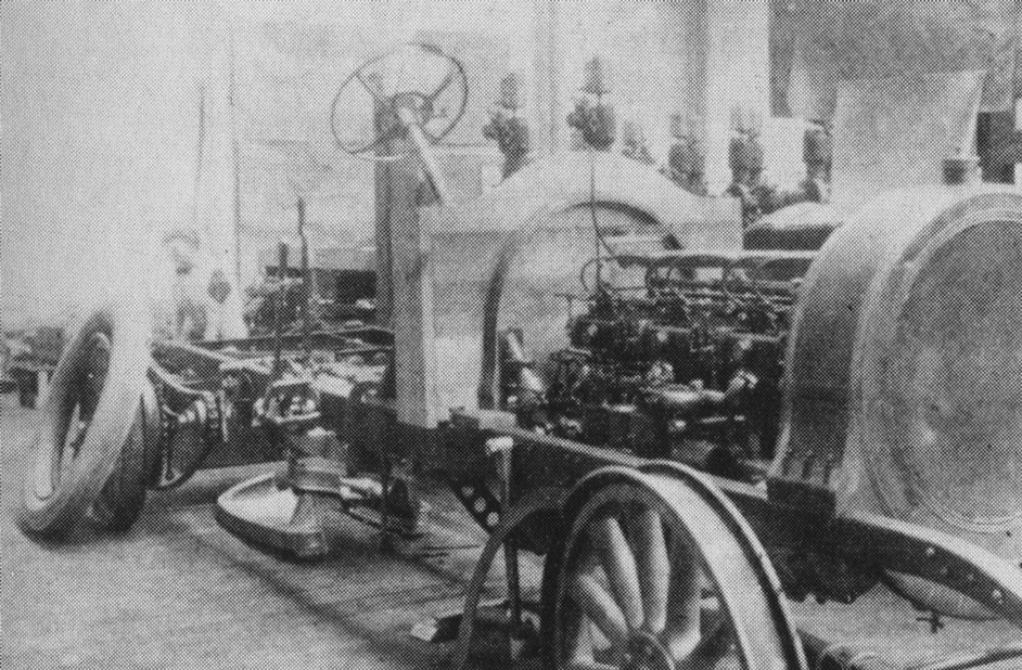 Liljeholmens Automobilfabrik Ormen Långe under sammansättning